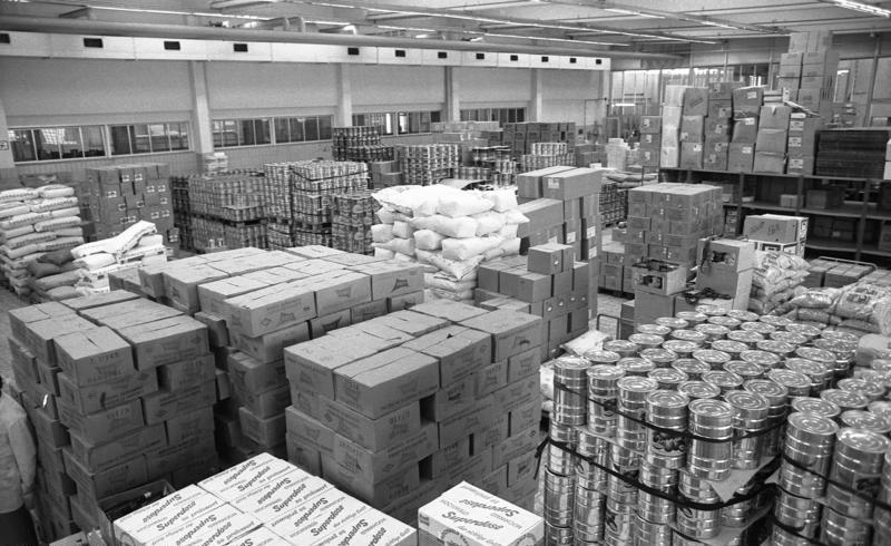 VW-Werk, Wolfsburg Wirtschaftsbetriebe